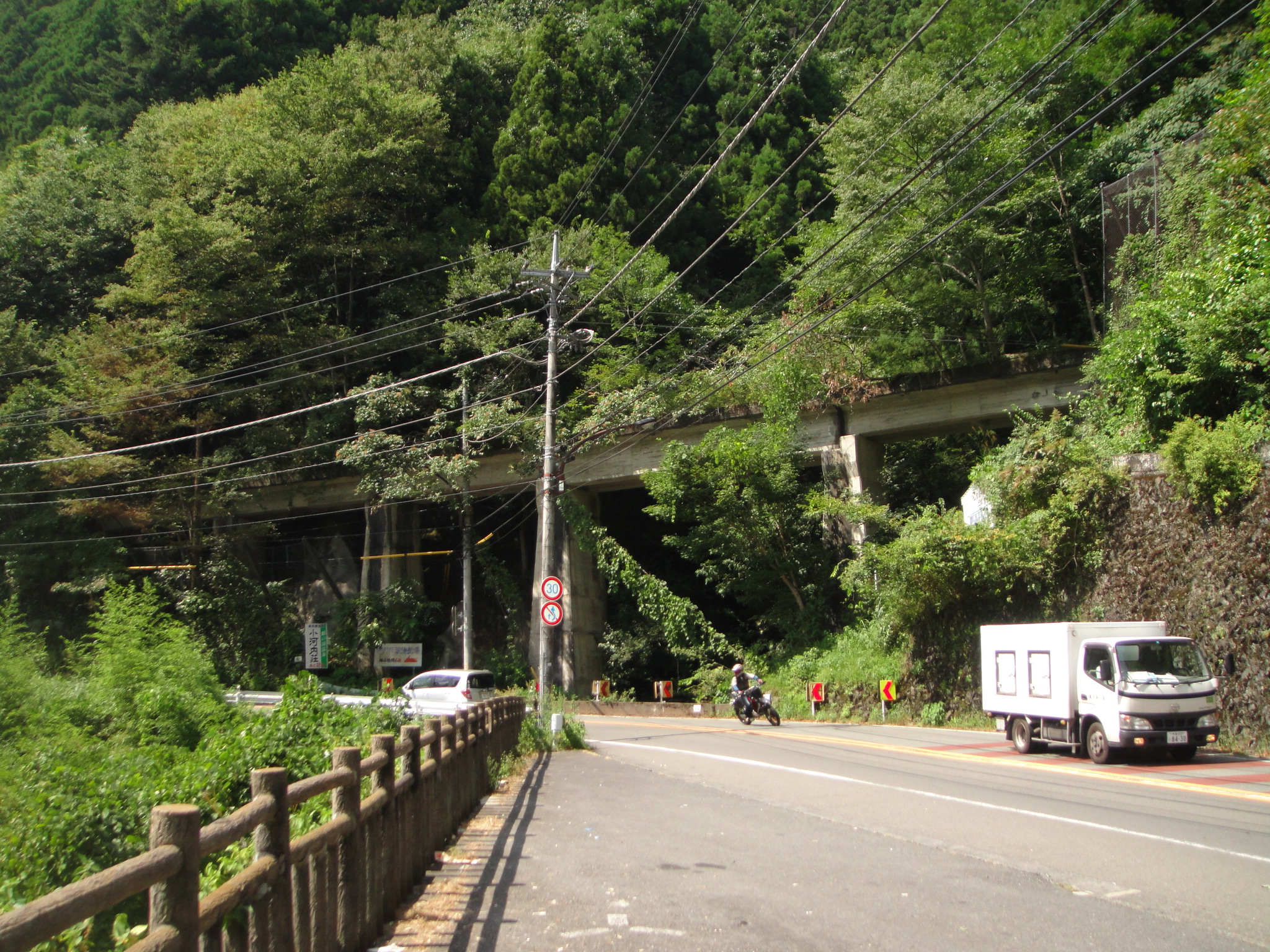 東京都水道局小河内線の第一水根橋梁